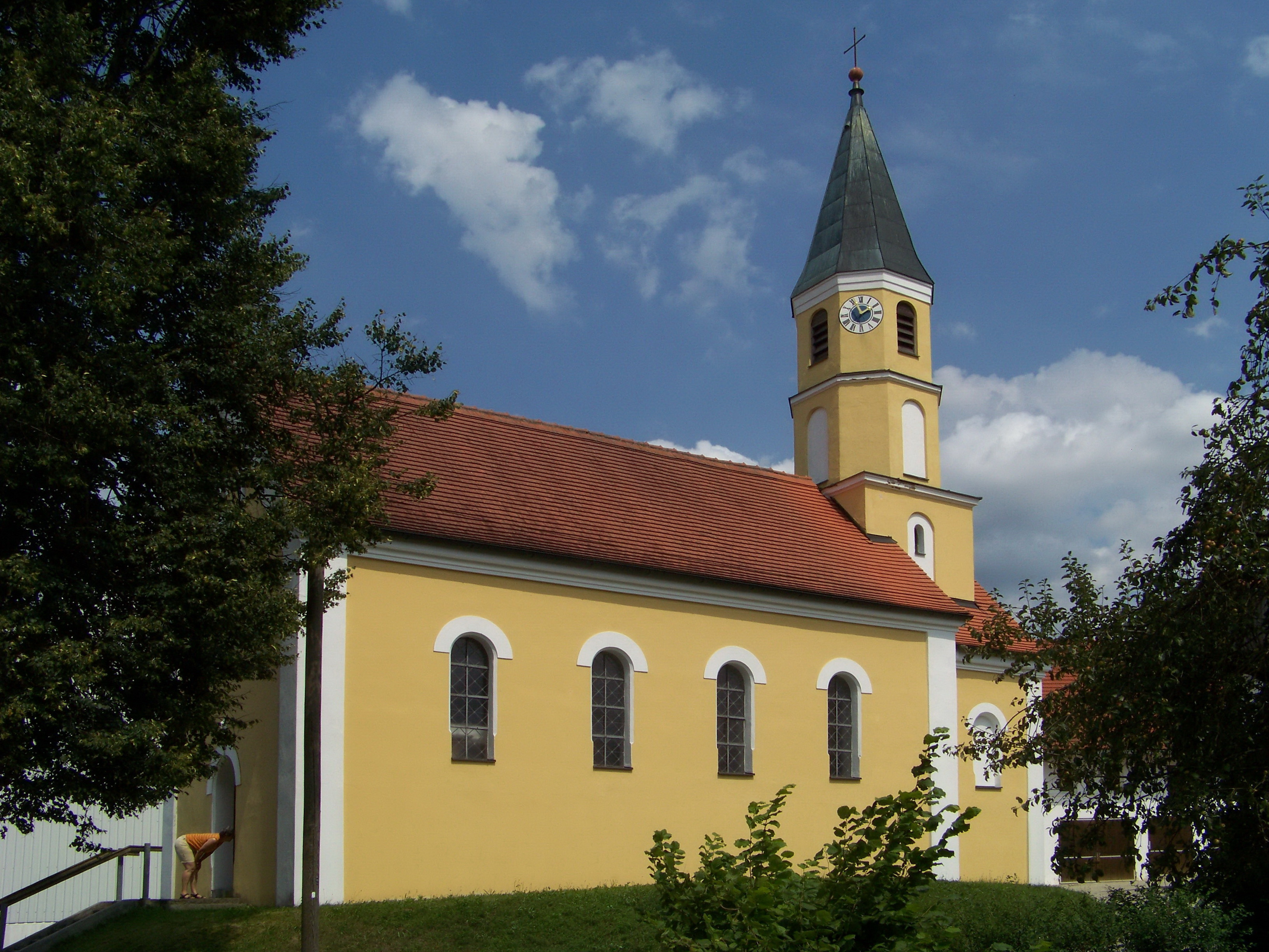 Aiglsbach, Pöbenhausen 18. Katholische Kapelle St. Martin. Saalbau mit Steildach und wenig eingezogenem Kastenchor, schlanker Chorturm mit Spitzhelm, 1908; mit Ausstattung.